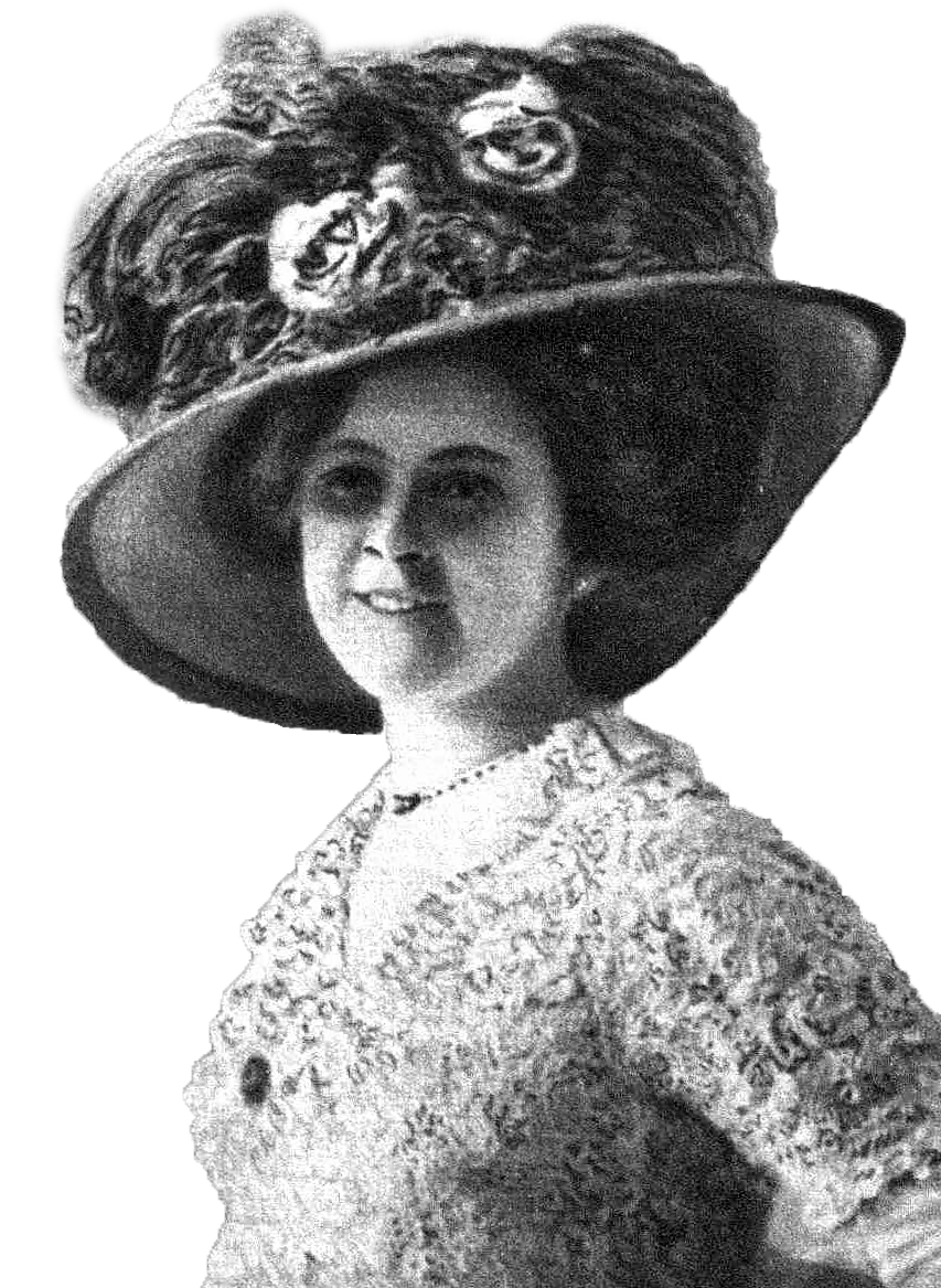 Lina Woiwode als vom Münchner Schauspielhaus kommender Zugang am Wiener Deutschen Volkstheater